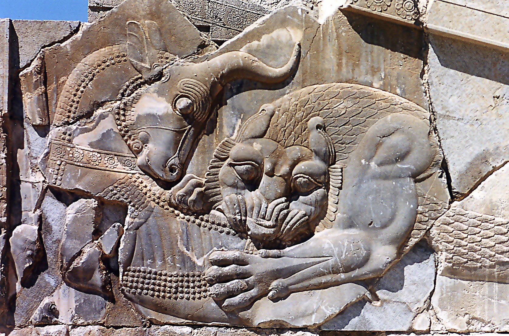 Persépolis (Iran). Bas-relief décorant un escalier monumental. VIe-Ve s. av. J.-C. Photo Ginolerhino 2002.